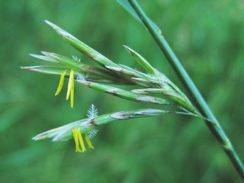 Wehrlose Trespe Bromus inermis, Müritz-Gebiet.